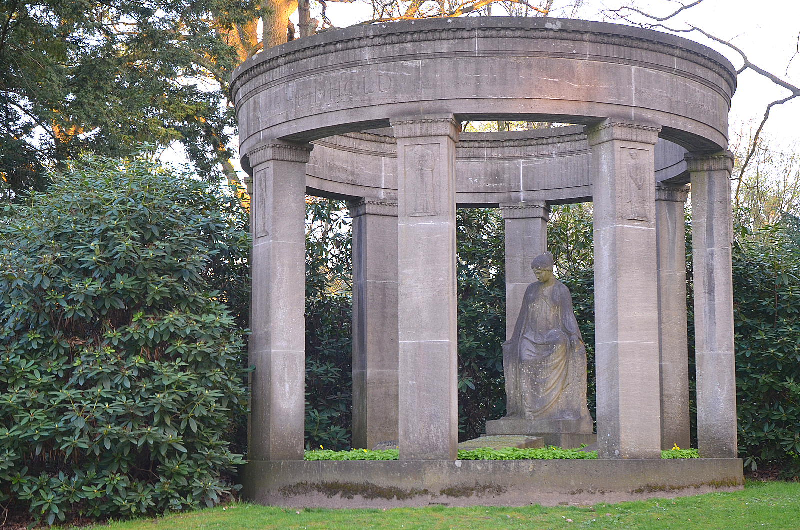 Erbbegräbnis der Familie Rheinhold, darunter der Fabrikant und Wohltäter Otto Rheinhold, auf dem Stadtfriedhof Stöcken in Hannover ...